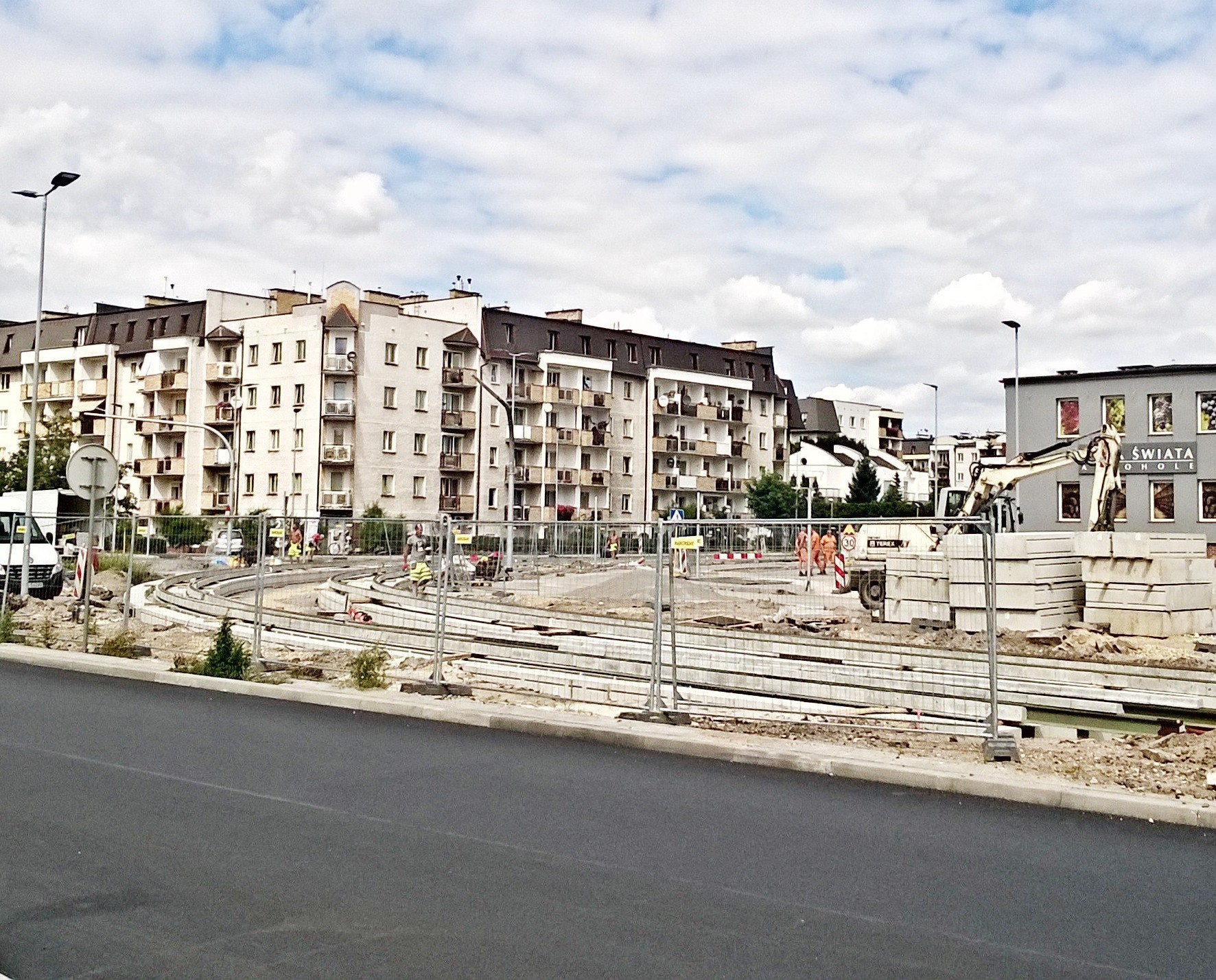 Budowa linii tramwajowej na Jar w Toruniu